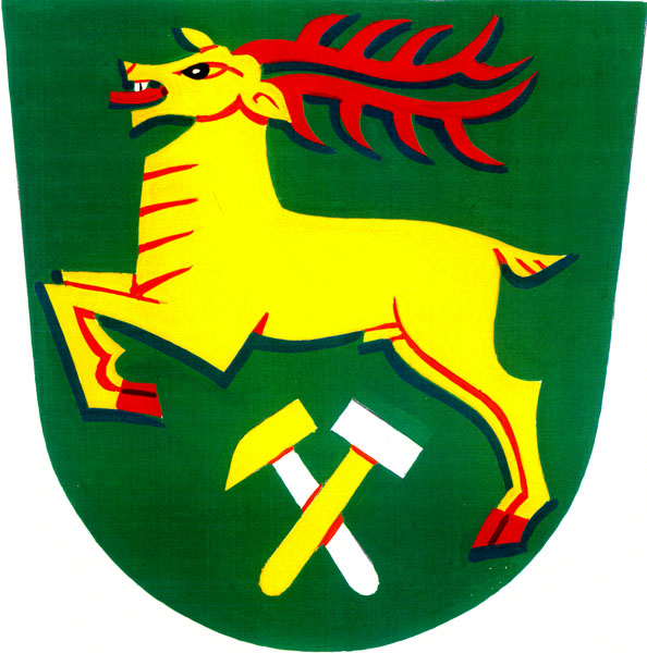 Znak obce Žďár nad Metují